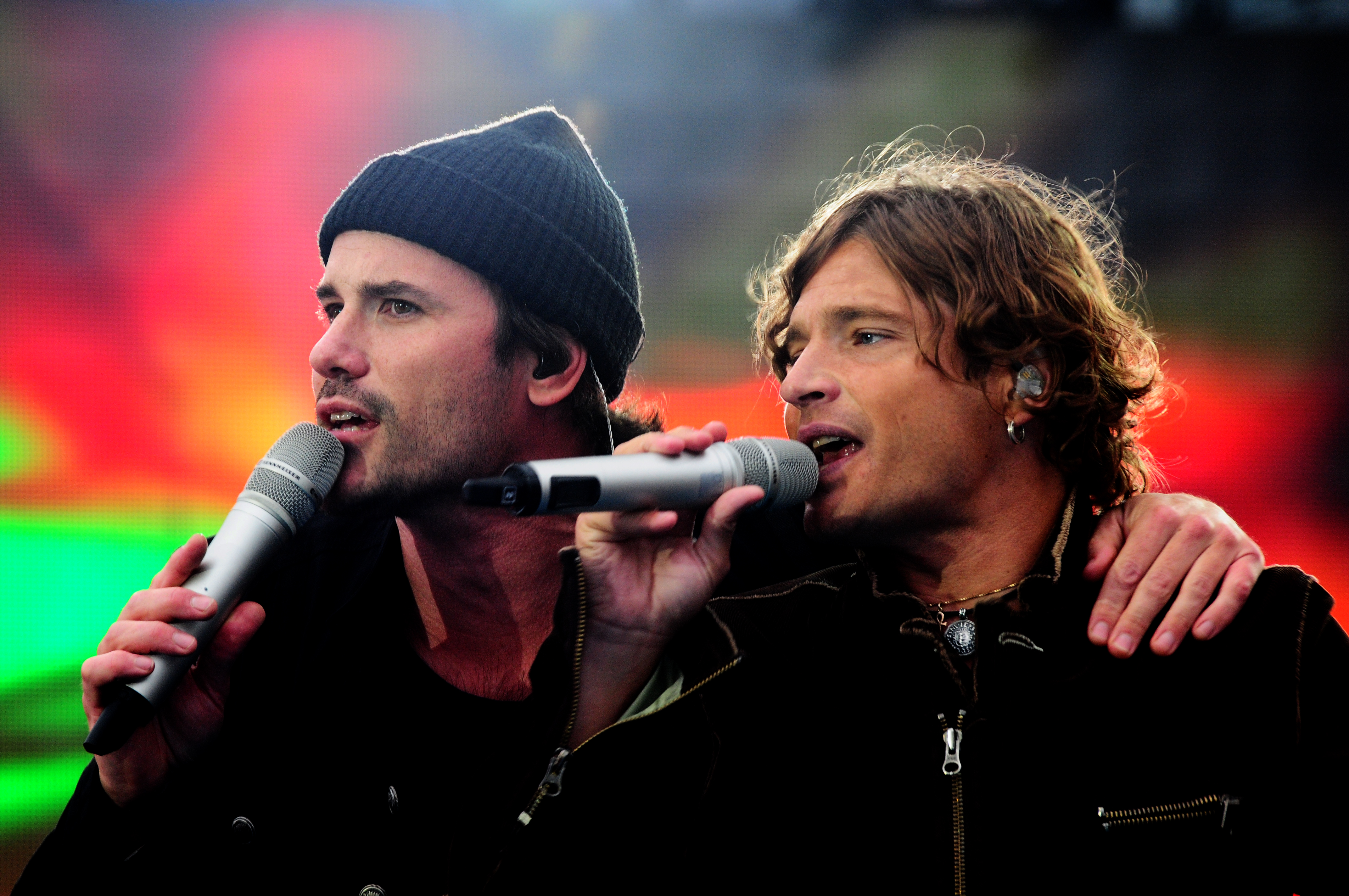 Martin Stenmarck & Andreas Johnson under Sommarkrysset 2012